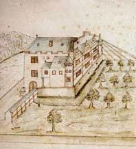 Burg Osterspai 1673